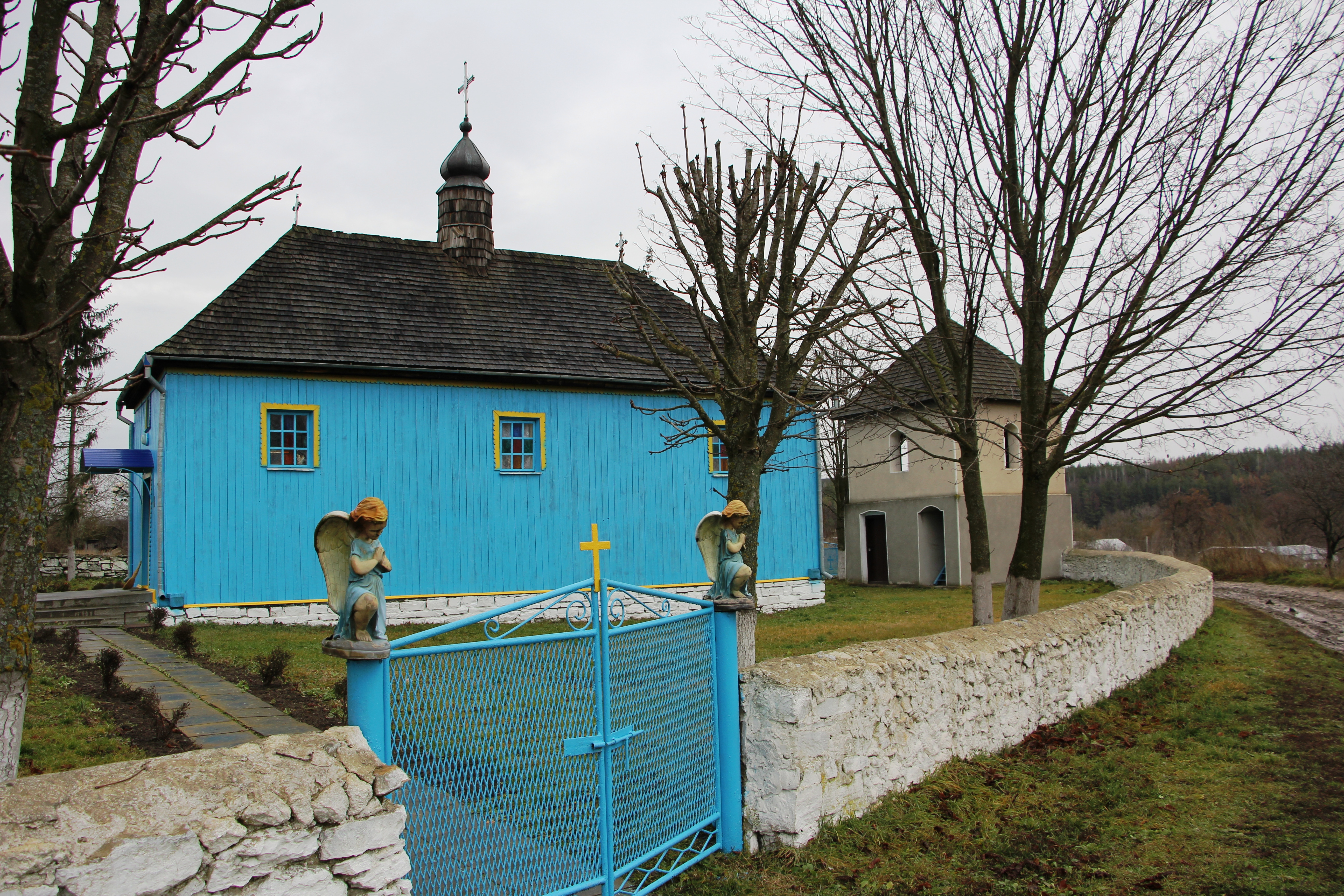 Церква св. Параскеви XVIIст